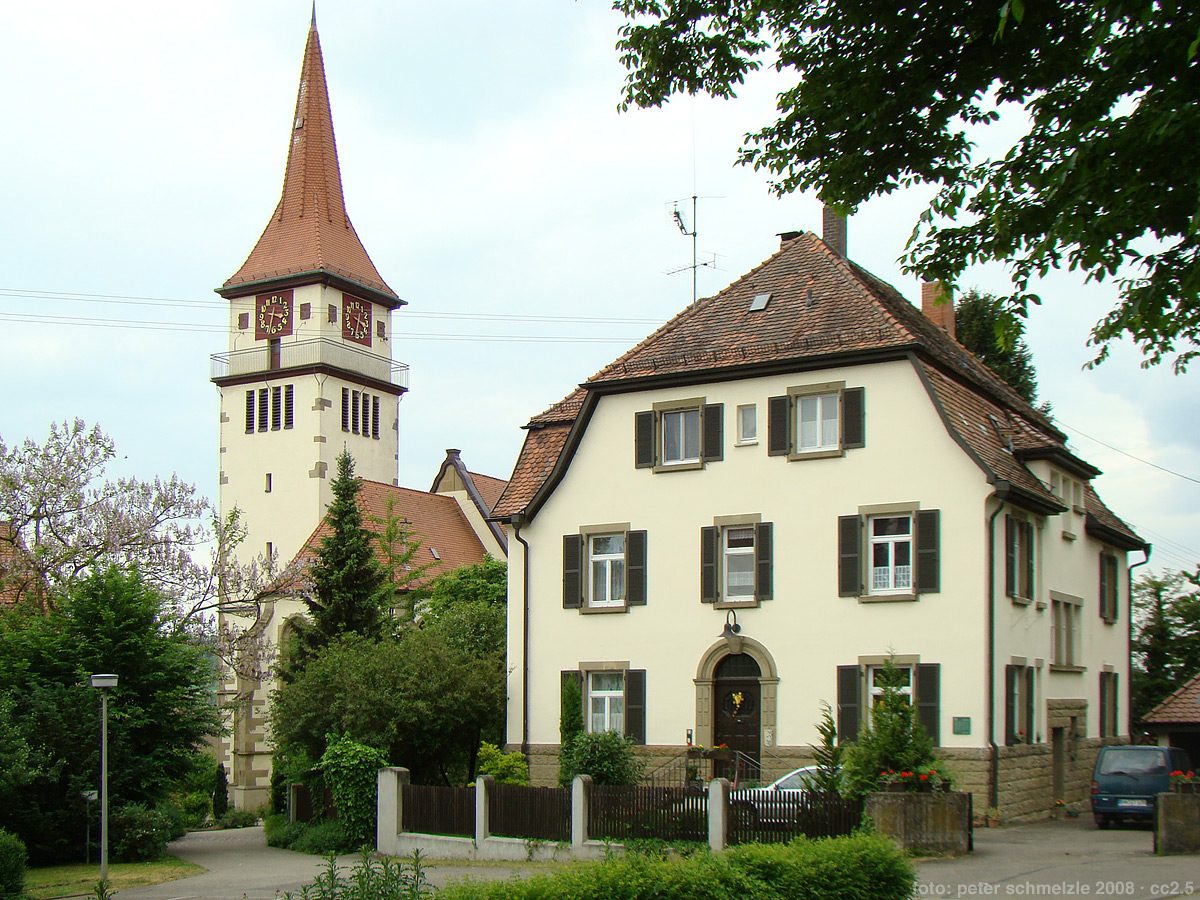 Ev. Kirche und Pfarrhaus in Ilsfeld